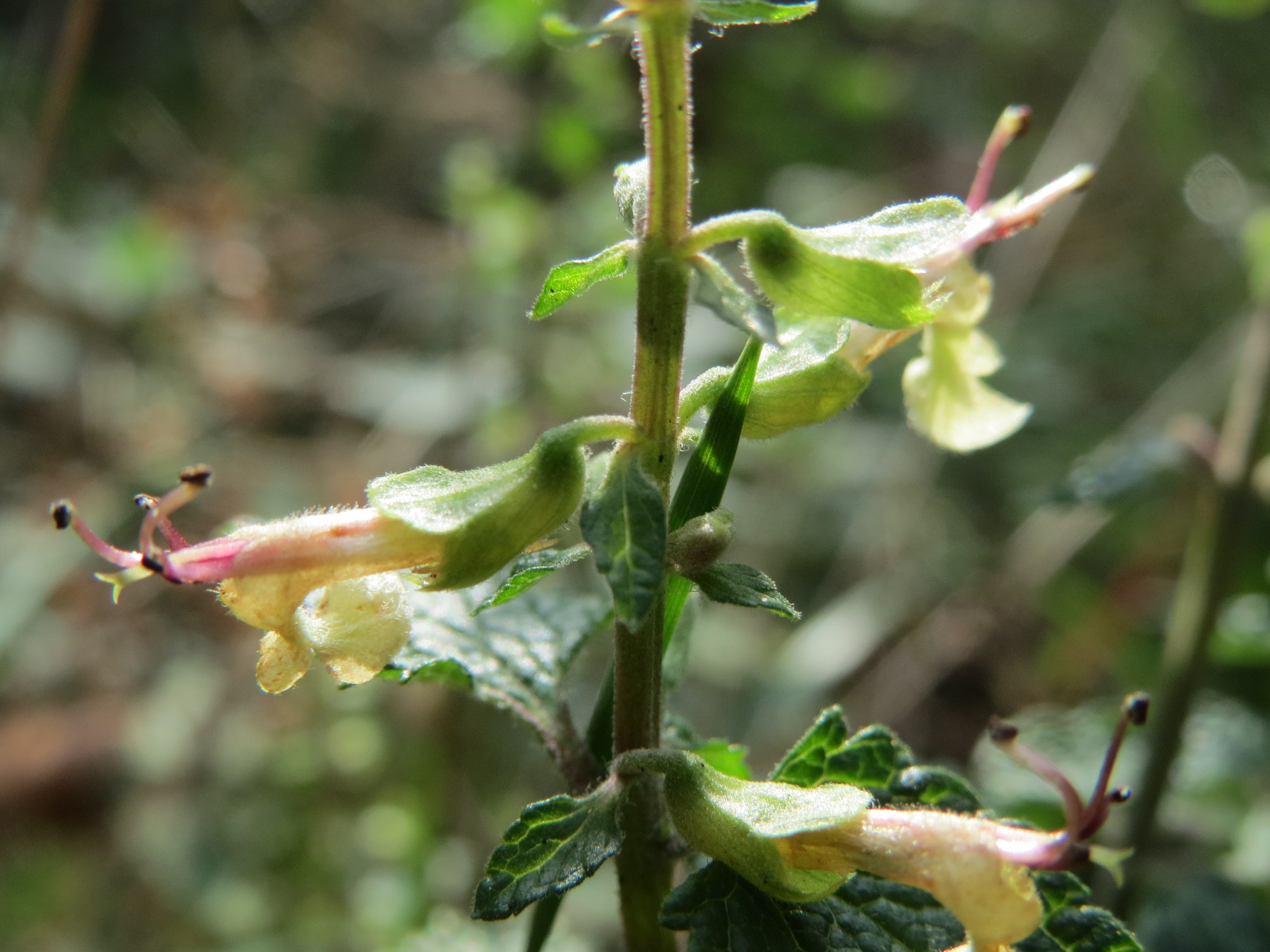 Salbei-Gamander (Teucrium scorodonia) im Schwetzinger Hardt